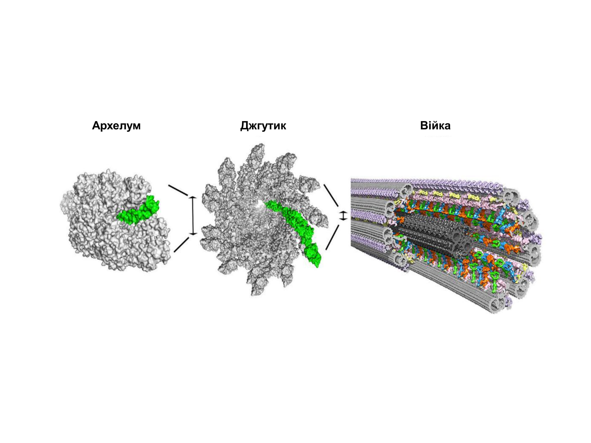 3D-кріо-ЕМ-реконструкції архелума Pyrococcus furiosus (діаметр – 10 нм), джгутика (діаметр – 25 нм) та аксонеми війки морського їжака (діаметр – 250 нм). Вертикальні стрілки співвідносять масштаби різної довжини. Окремі субодиниці архелума та джгутика забарвлені у зелений колір. Всередині джгутика розміщується центральний канал. Структури аксонеми позначені кольором: дуплети мікротрубочок (сірий), центральний парний комплекс (вугільний), радіальні спиці 1–3 (RS1, зелений; RS2, синій; RS3, помаранчевий), зовнішня (лавандовий) і внутрішня (рожевий) динеїнові ручки, нексин-динеїновий регуляторний комплекс (жовтий)